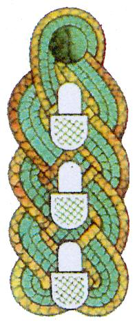 Schulterstücke Generalforstmeister Staats- und Militärforstwirtschaft DDR